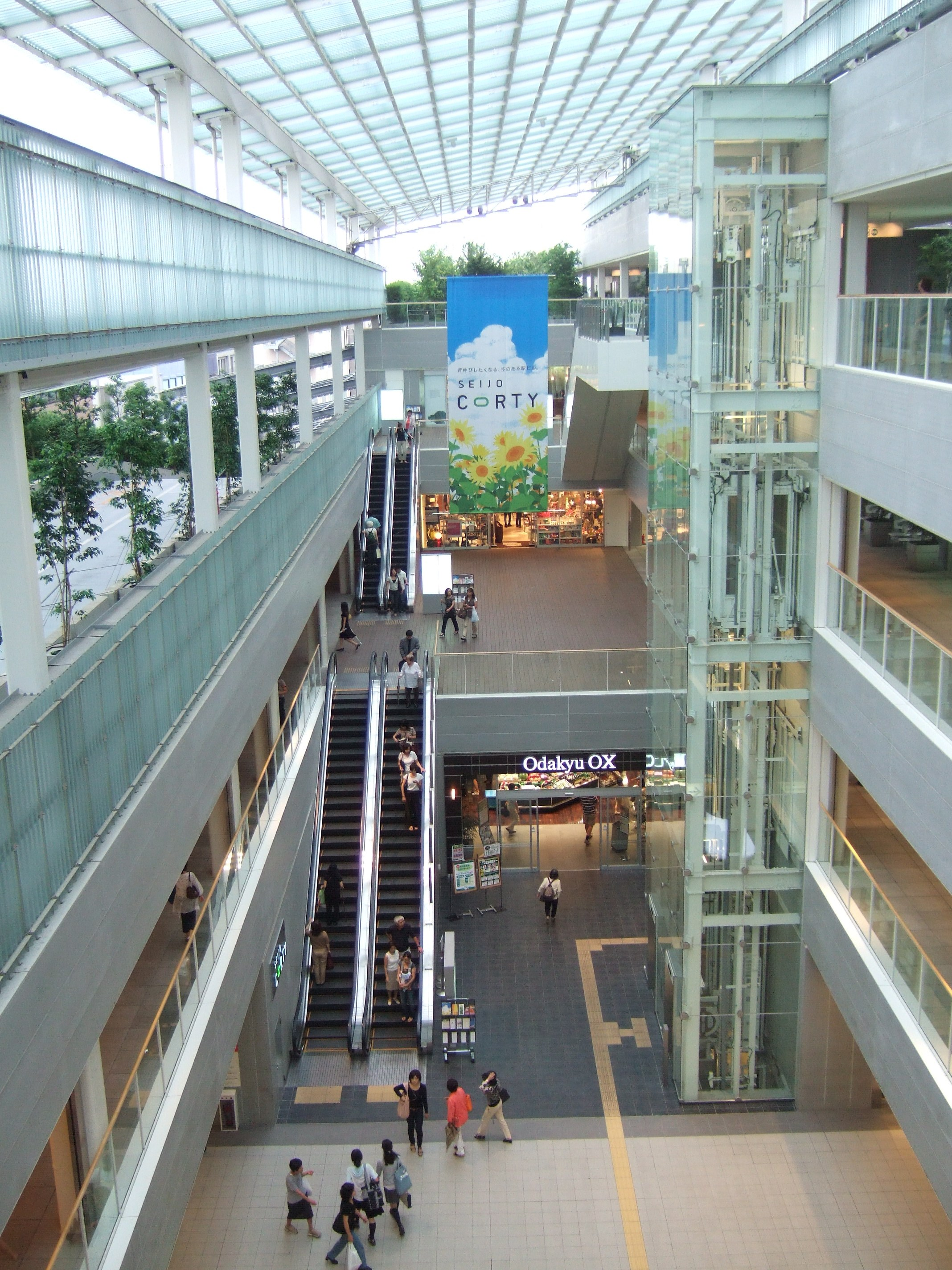 成城コルティ吹抜け